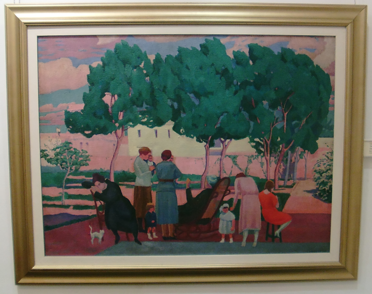 Carmelo de Arzadun